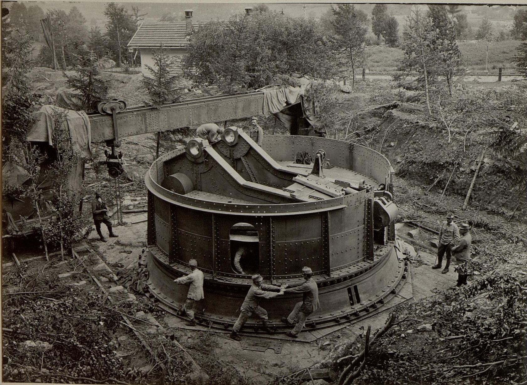 Stellung einer 42cm-Haubitze, Lafette im Kanaltal bei Cucco, Slowenien.